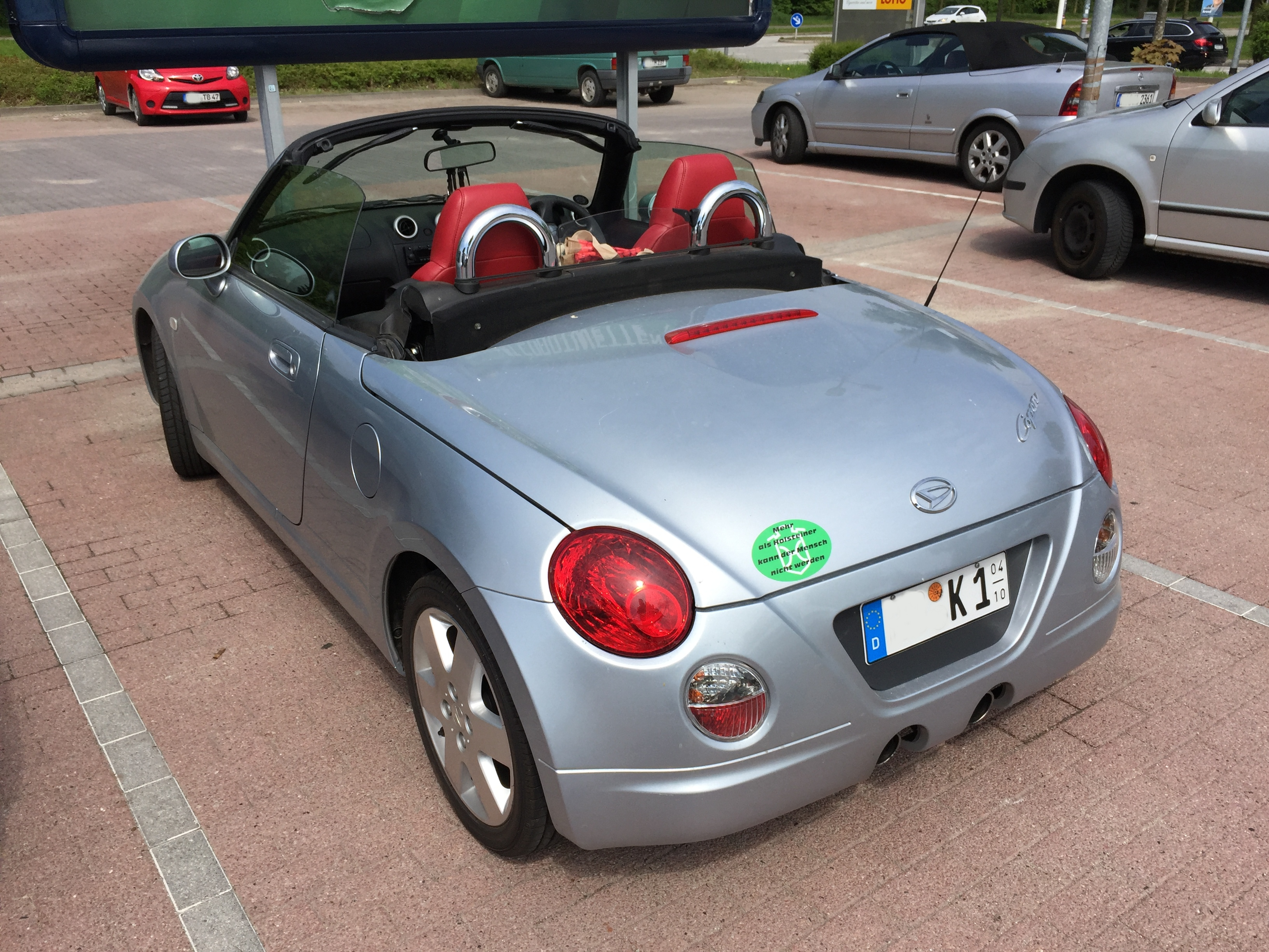 Daihatsu Copen open